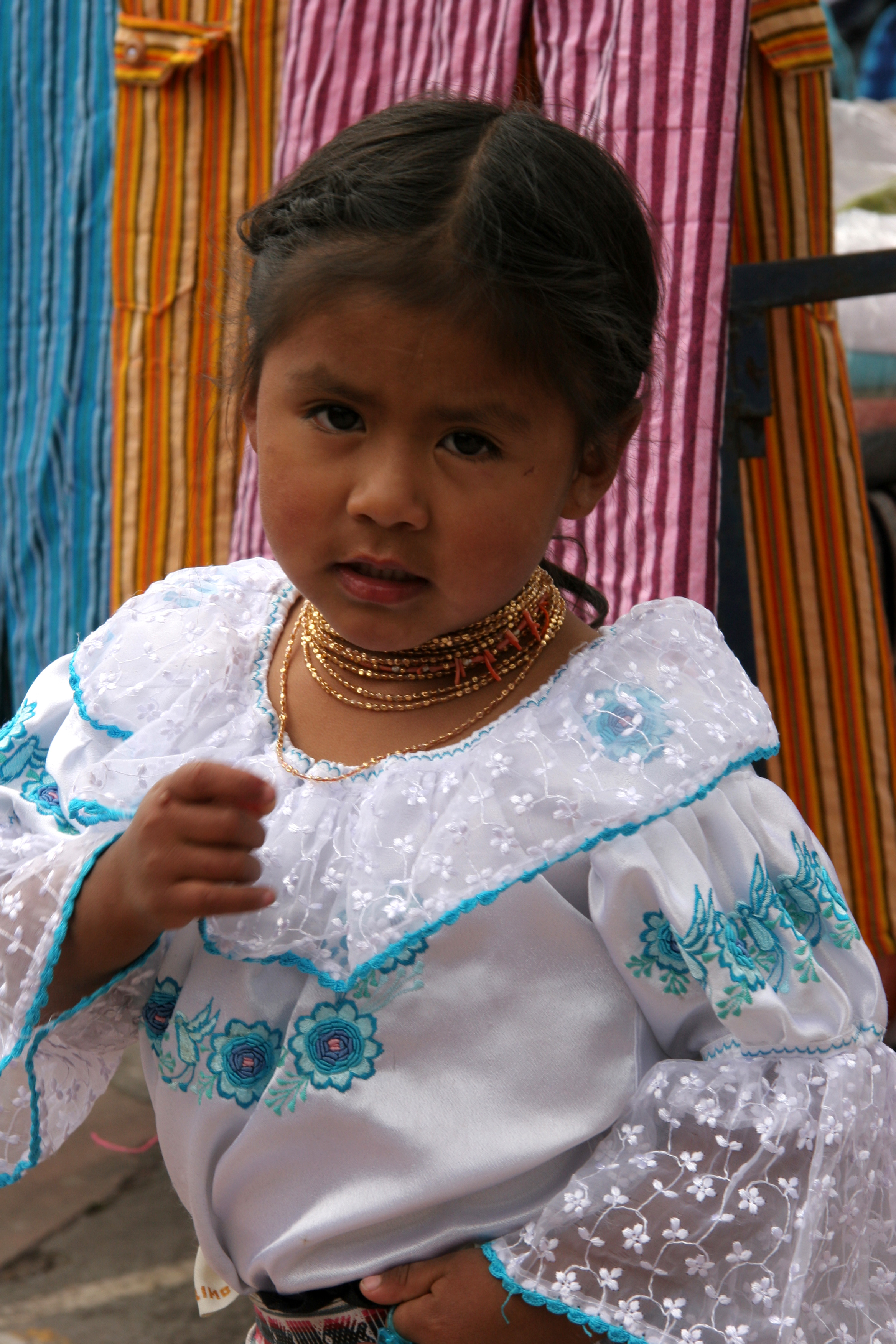 équateur, otavalo, fillette quechuas otavalo